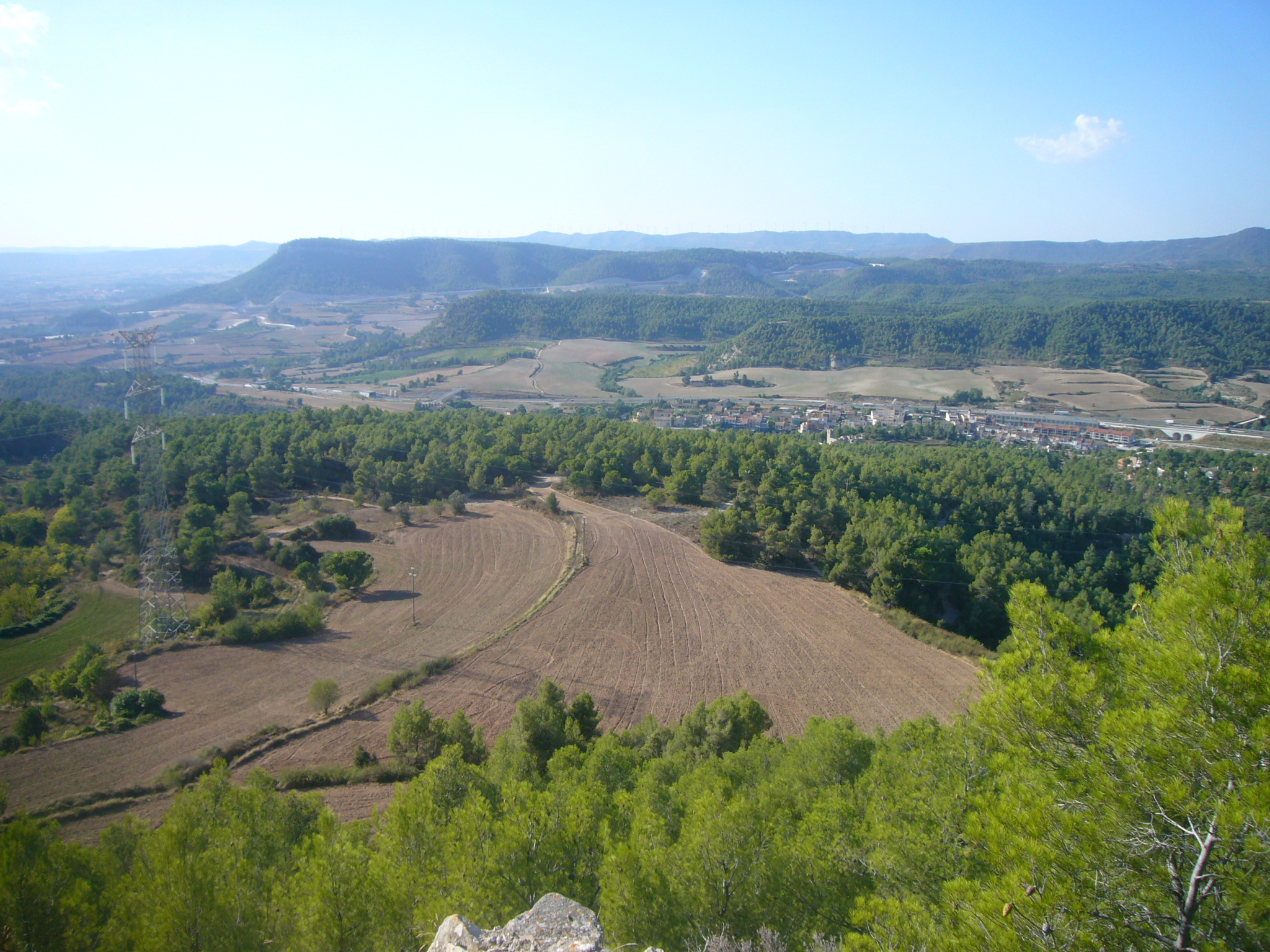 Vista des del cim del castell del Castellolí, mirant cap al nord. A l'esquerra, el Puig d'Aguilera. Al centre, el Turó de la Mel i la muntanya del Catarro. Una mica a la dreta, la serra del Ninots, just damunt de l'Autovia i el poble de Castellolí.